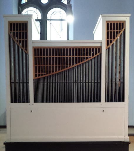 Chororgel der Diakoniekirche Bad Kreuznach